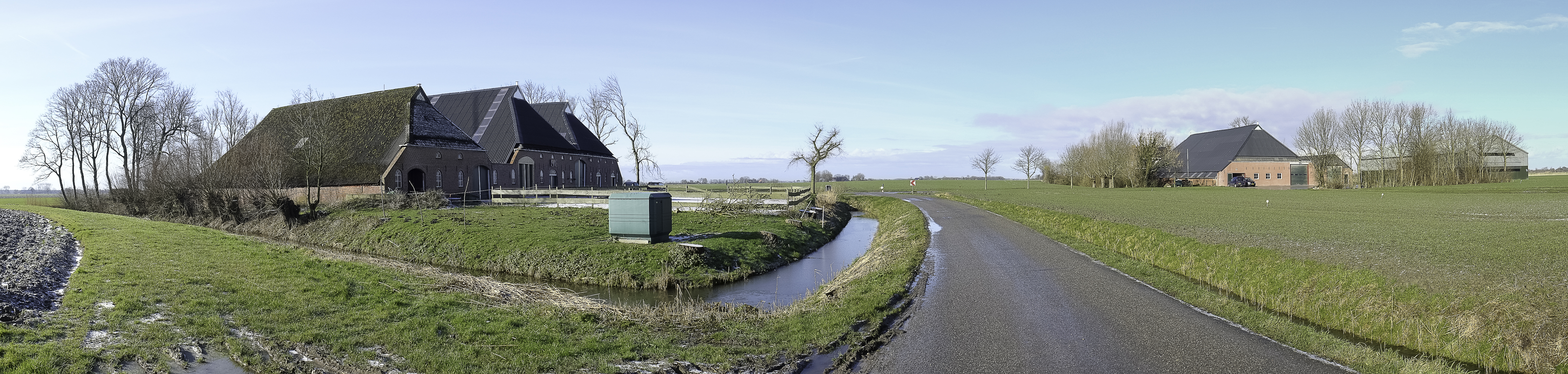 Gezicht op Walsweer